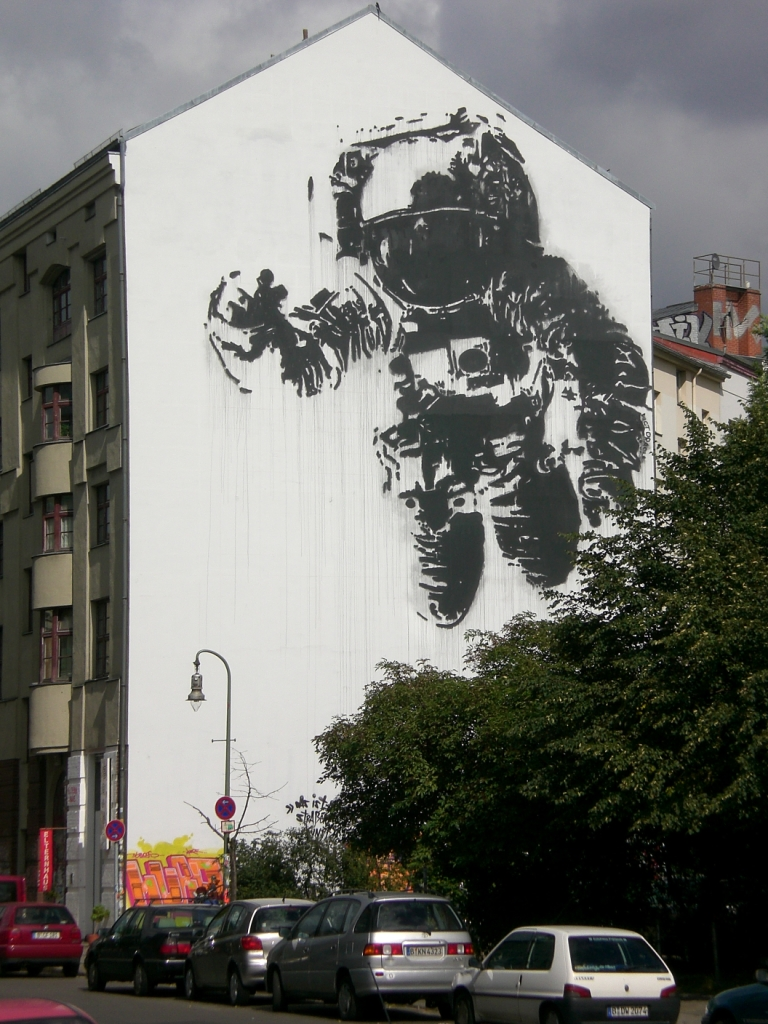 Astronaut Mural in Berlin-Kreuzberg